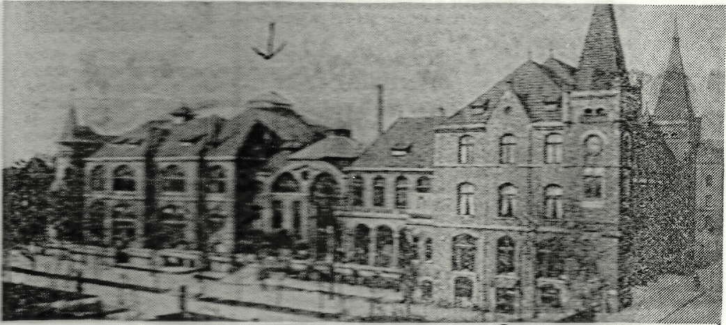 Alte Stadthalle Osnabrück (1918-1944) für 5.000 Besucher. Vorne rechts Kinderheim für ca. 100 Kinder.